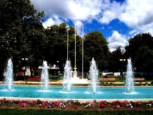 se encuentra en la 9 Region de la Araucania, Provincia de Malleco, Comuna Angol